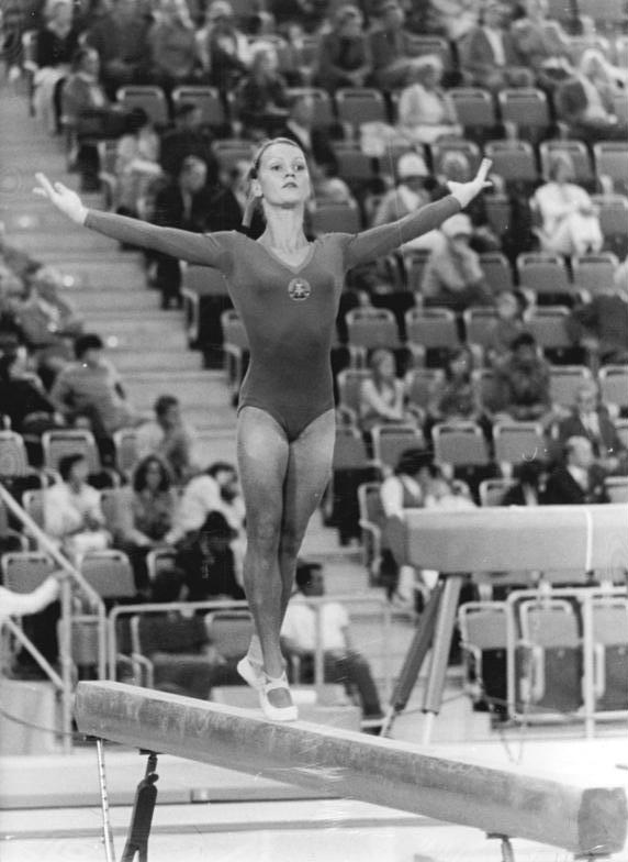 ADN-ZB-Gahlbeck-22.8.1972-ma-München: XX. Olympische Sommerspiele - Training der DDR-Turnerinnen. In der Sporthalle des Olympiaparks, Austragungsstätte der olympischen Turnwettbewerbe, bereitet sich Weltmeisterin Karin Janz (SC Dynamo Berlin), hier auf dem Schwebebalken, beim öffentllichen Training auf die Pflicht des Mannschaftskampfes vor, die am 27.8.1972 ab 8.30 Uhr beginnt.